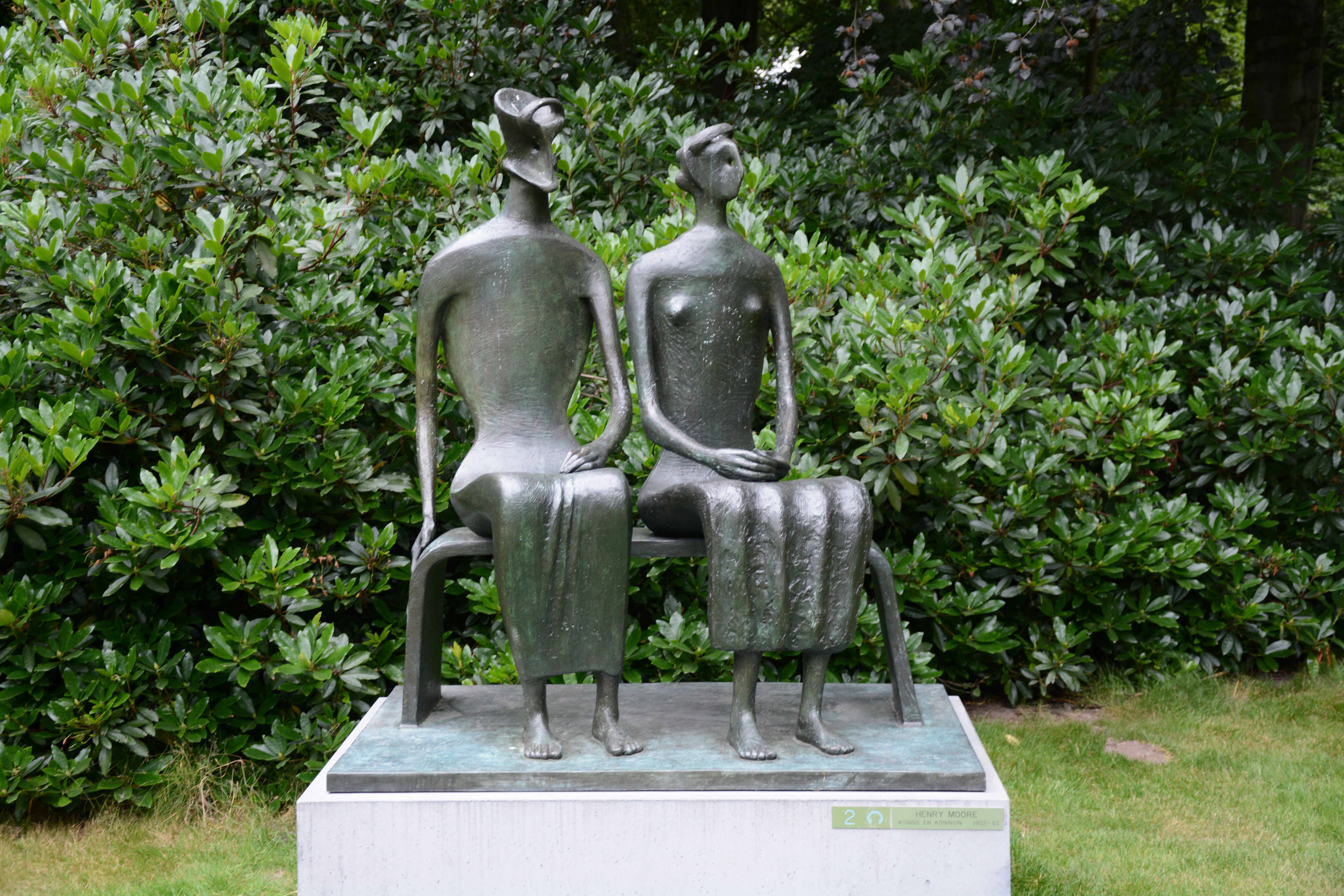 Koning en Koningin door Henry Moore